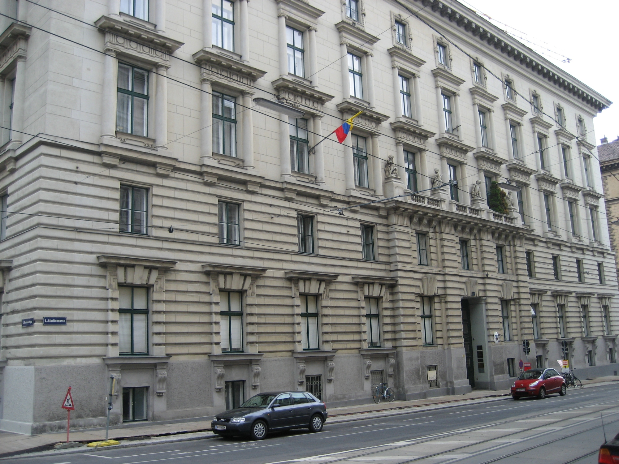 das Haus Stadiongasse 6-8 im 1. Bezirk, in Wien